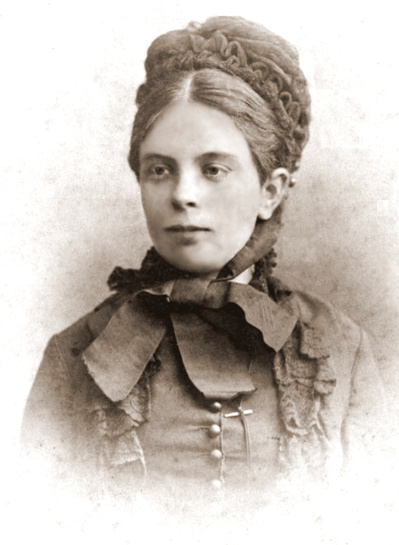 Антуанета Робертаўна Бенземан (Роланд)